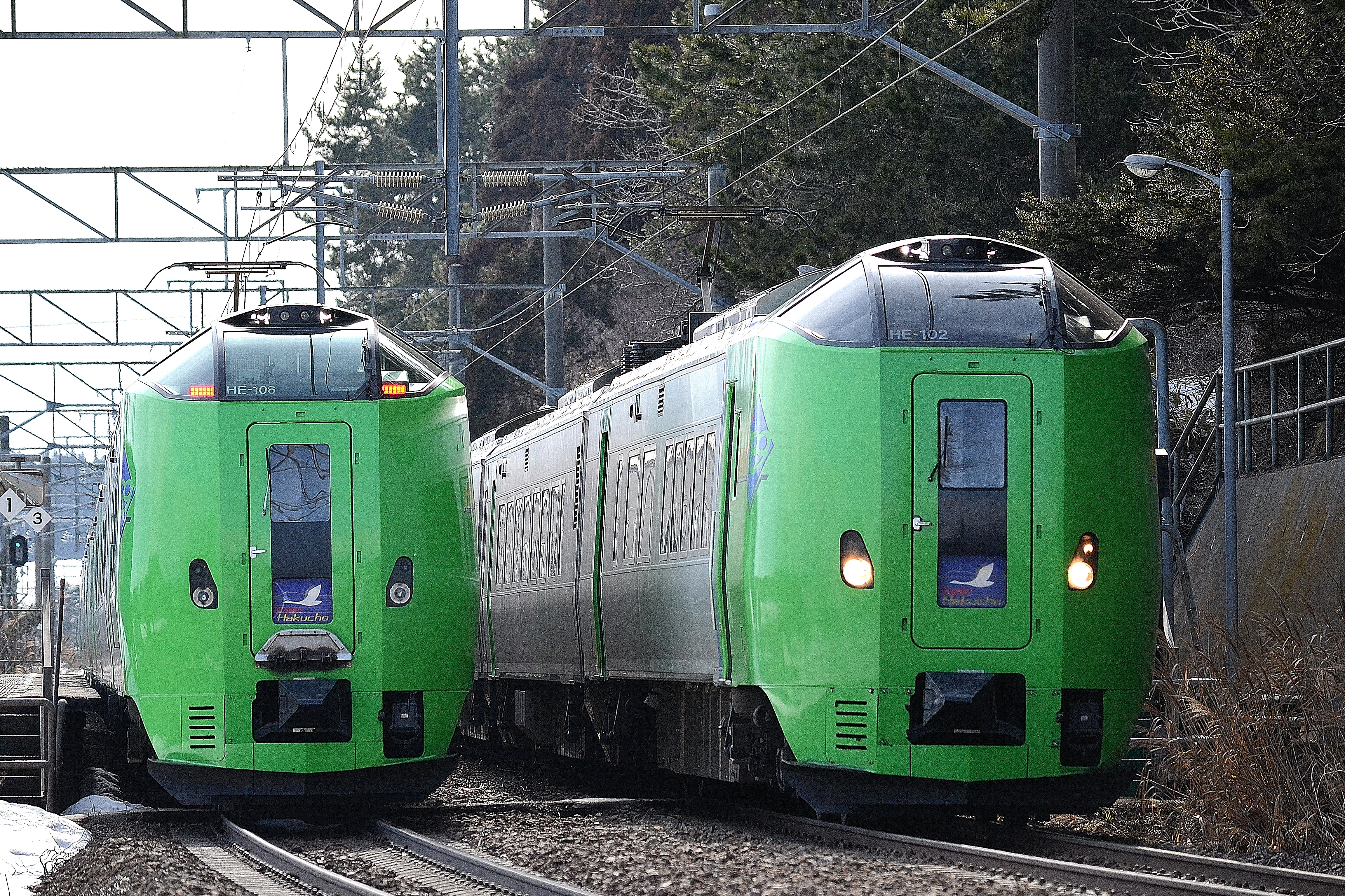 釜谷駅で交換する特急｢スーパー白鳥｣の789系電車